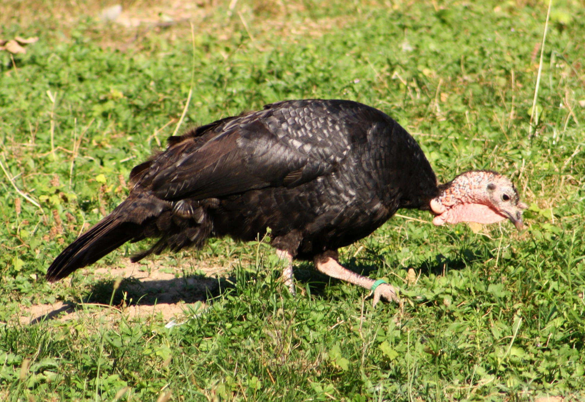 Dinde noire du Bourbonnais au château de Bouthéon